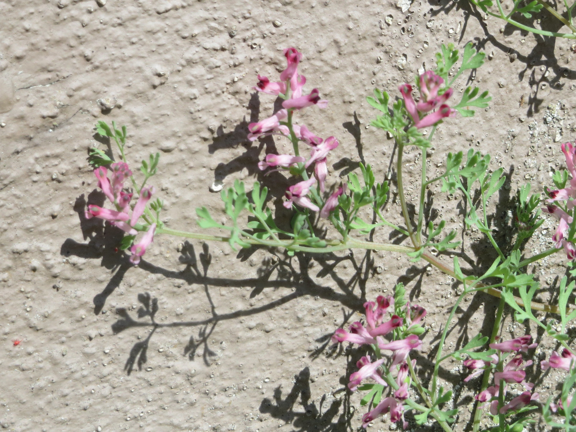 Ritzenbotanik: Gewöhnlicher Erdrauch (Fumaria officinalis) in Hockenheim